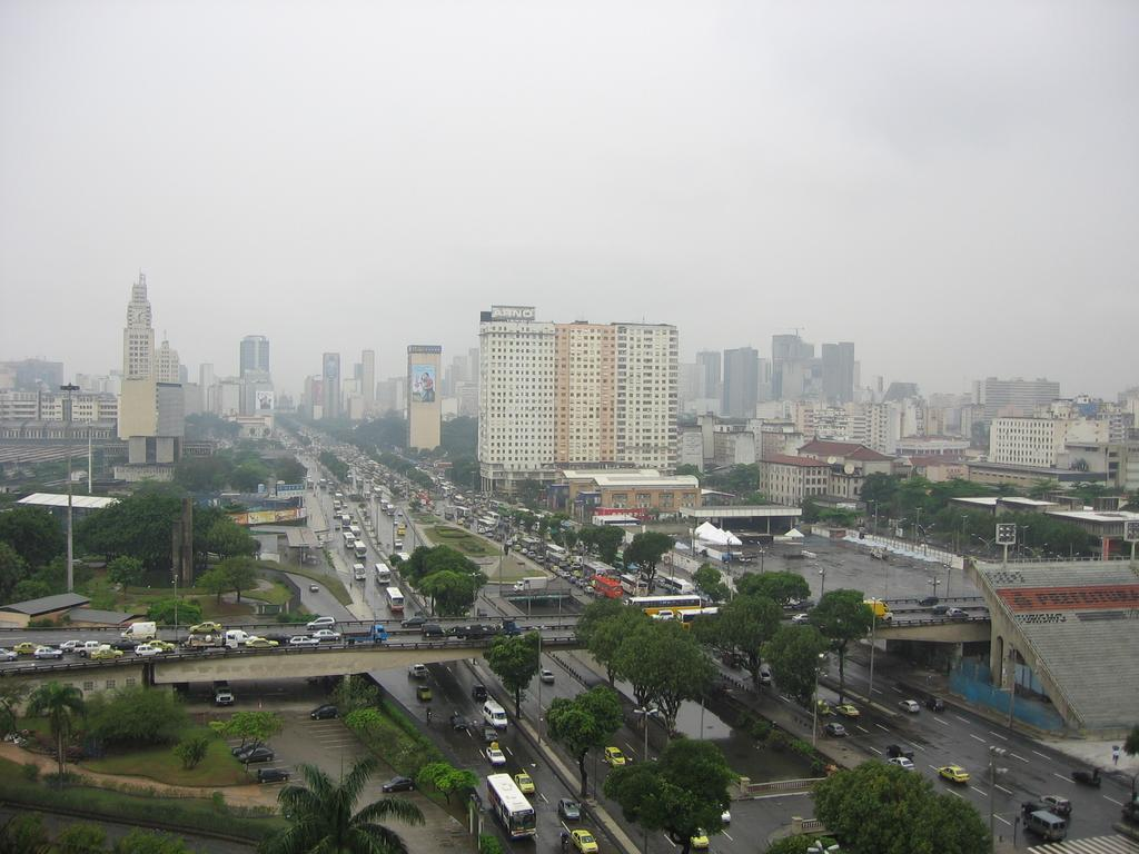 Av. Presidente Vargas, vista da UNESA Praça XI.